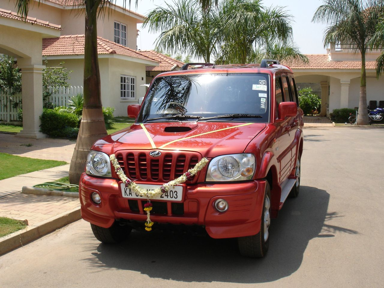 Endlich haben wir unseren Wagen geliefert bekommen.